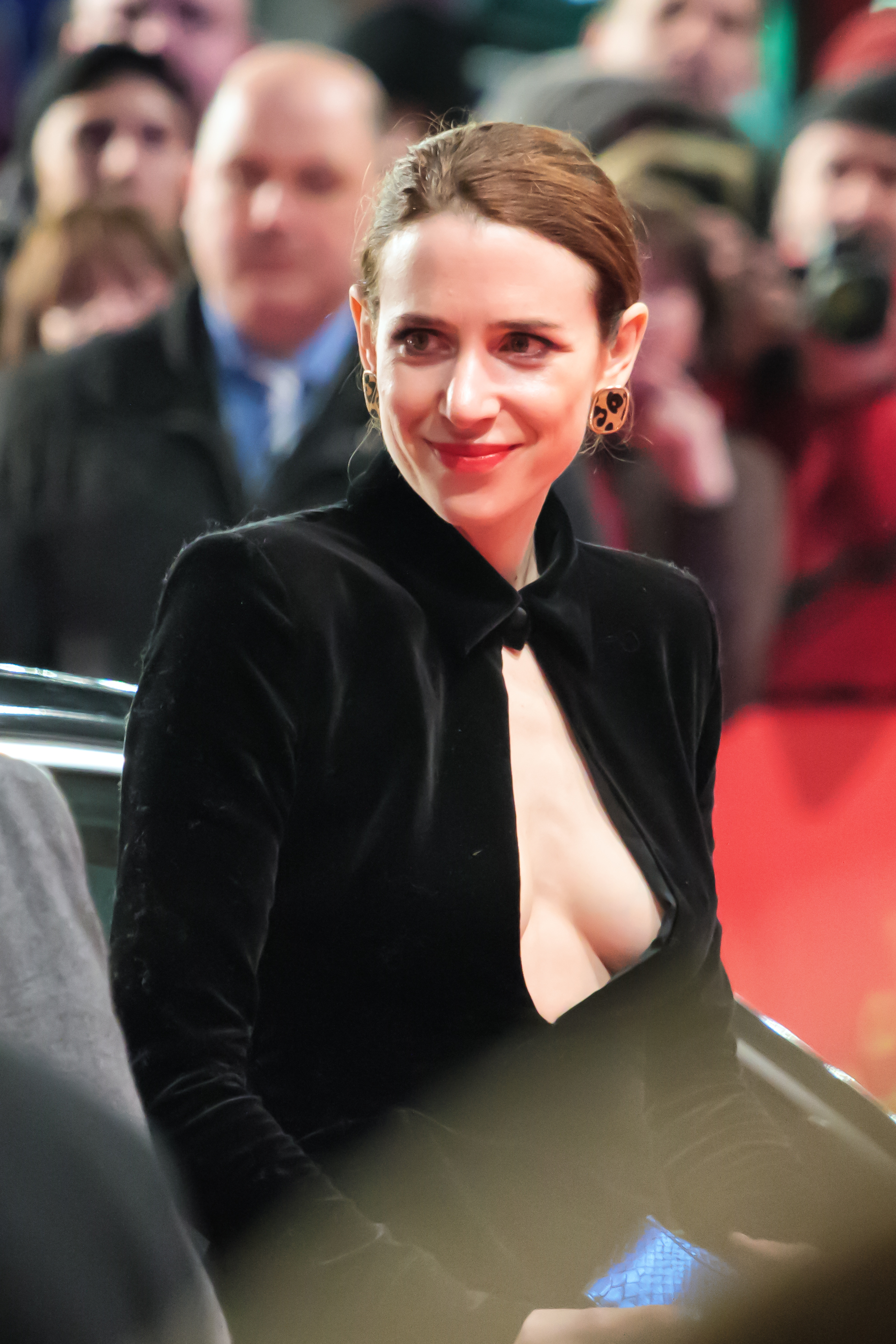 Julia Malik - Berlinale - 2013